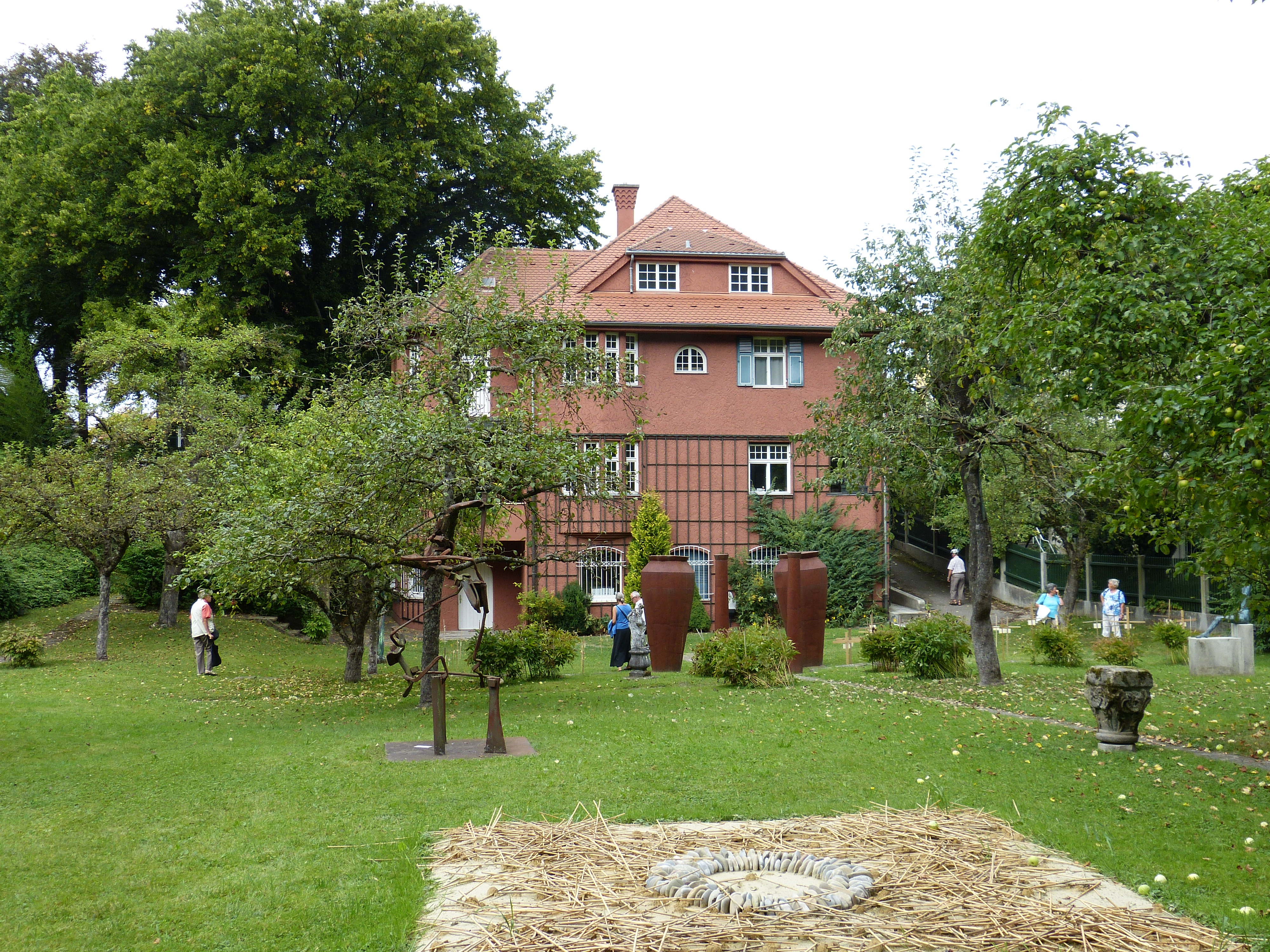 Architekturmuseum Schwaben in Augsburg, Rückseite der Buchegger-Villa vom Garten aus.